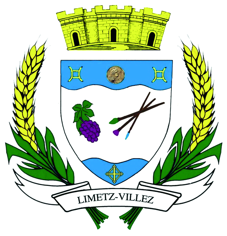 Blason de la ville de Limetz-Villez